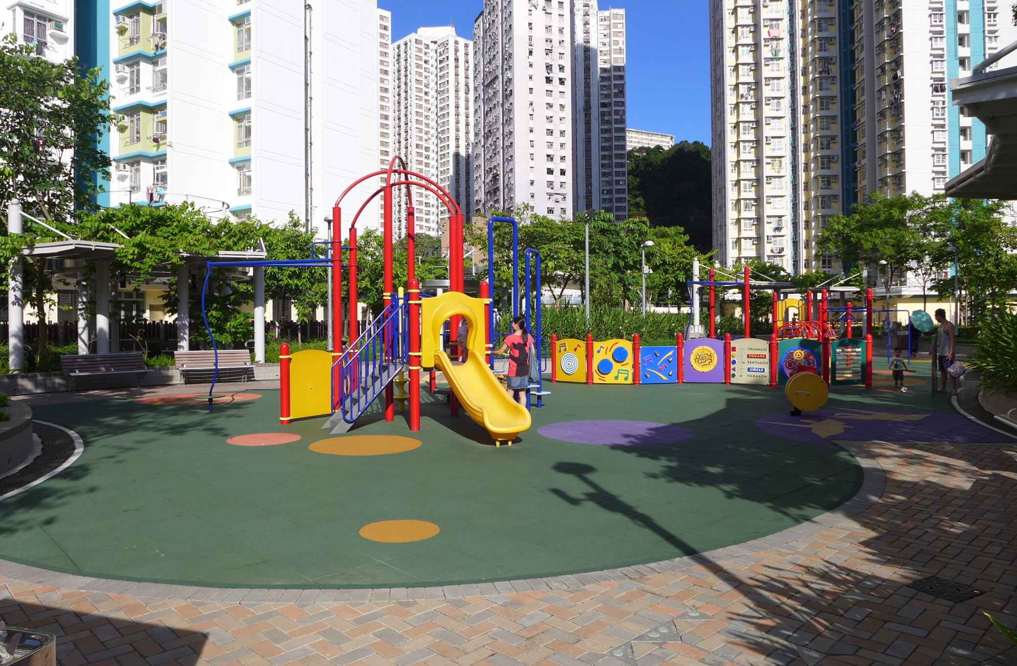 Ngau Tau Kok Park Children Play Area